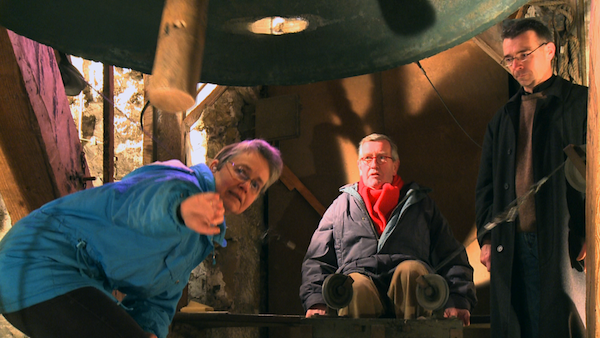 Die derzeitigen Glöckner v.l.: Dr. Barbara Rohden, Klaus Nordmann, Marcus Büteröwe.